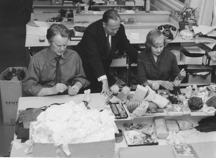 Yrittäjät Helena ja Martti Kuuskoski (istumassa) peikkoverstaalla (uusissa tiloissa), mukana tärkea vierailija.